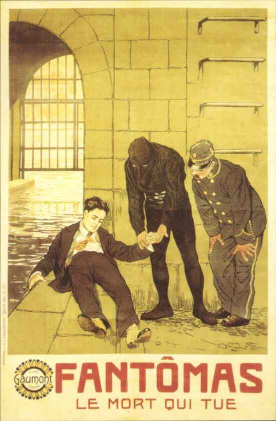 Le Mort qui tue (1913), affiche du troisième film adapté de la saga Fantômas par Louis Feuillade d'après le roman éponyme de Pierre Souvestre & Marcel Allain.